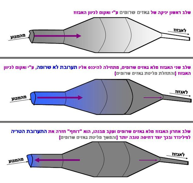 אגזוז שתי פעימות נוצר ע"י ixmix, מנהל פורום הקטנועים בתפוז.